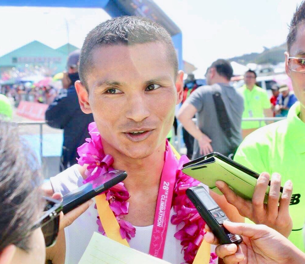 नेपाली: म्याराथन जितिसके पछि मिडियाहरूसँग अन्तर्वार्ता दिदै निमेश गुरुङ